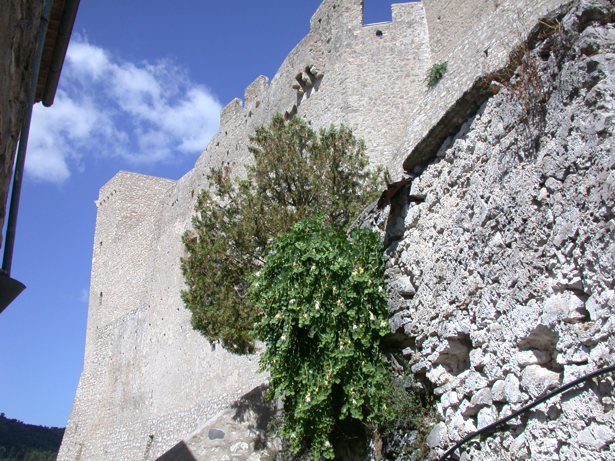 Itri, provincia di Latina, regione Lazio, Italia. Città alta, il Castello, particolare